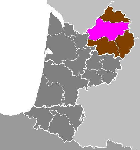 Maps of arrondissements and cantons of France: Département de la Dordogne - Arrondissement de Périgueux.PNG (Région Aquitaine)